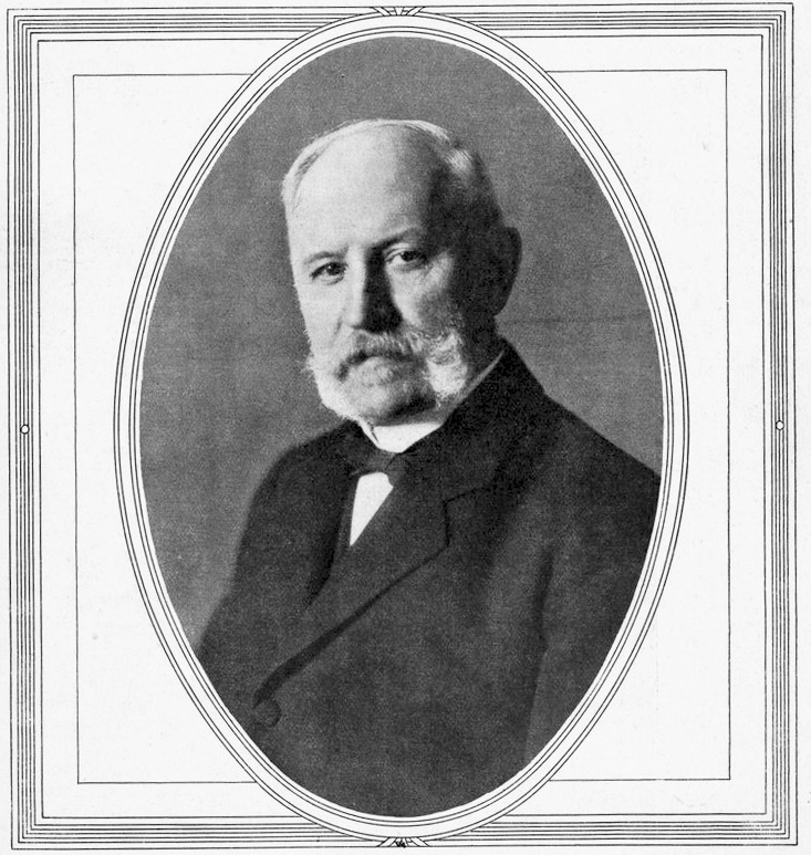 Hugo Hernlund (1861-1930) på omslaget till Hvar 8 Dag 1911.